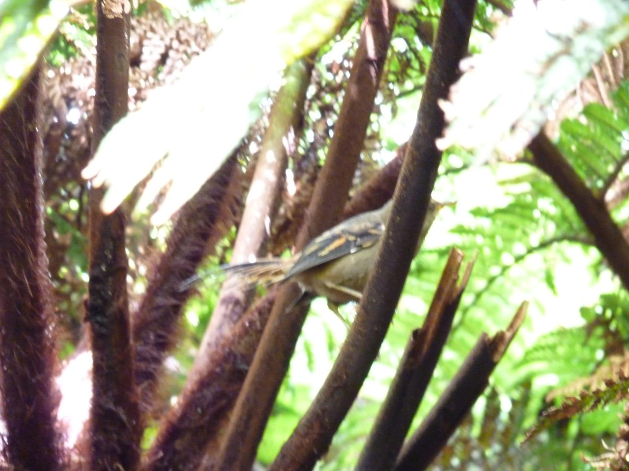 Aphrastura masafuerae, ave endemica de la Isla Alejandro Selkirk, ver informacion en